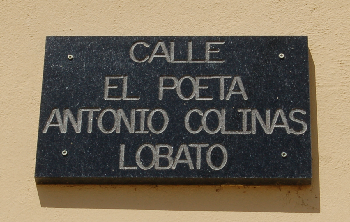 Placa da rúa do poeta Antonio Colinas Lobato en Fuente Encalada